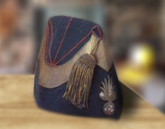 Bonnet de police de sous-officier à gland d'or, XIXe siècle (Sapeur-pompier)